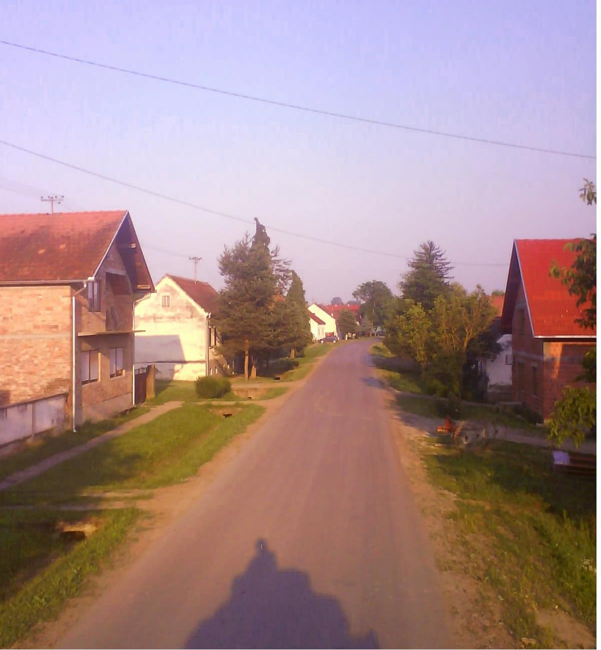 Donji Kraj u Banovcima